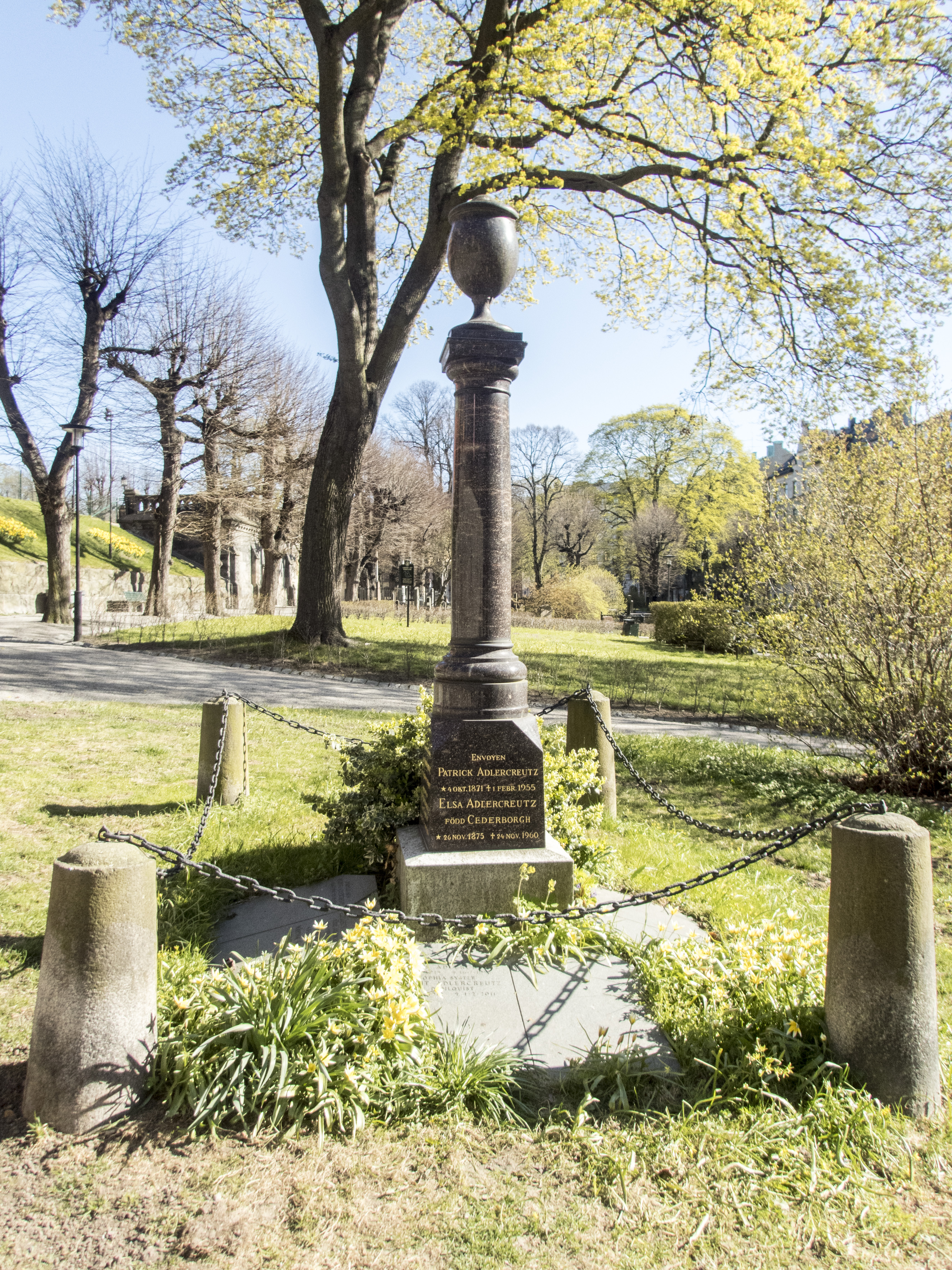 Patrick Adlercreutz & Elsa Adlercreutz (född Cederborg), gravvård på Johannes kyrkogård